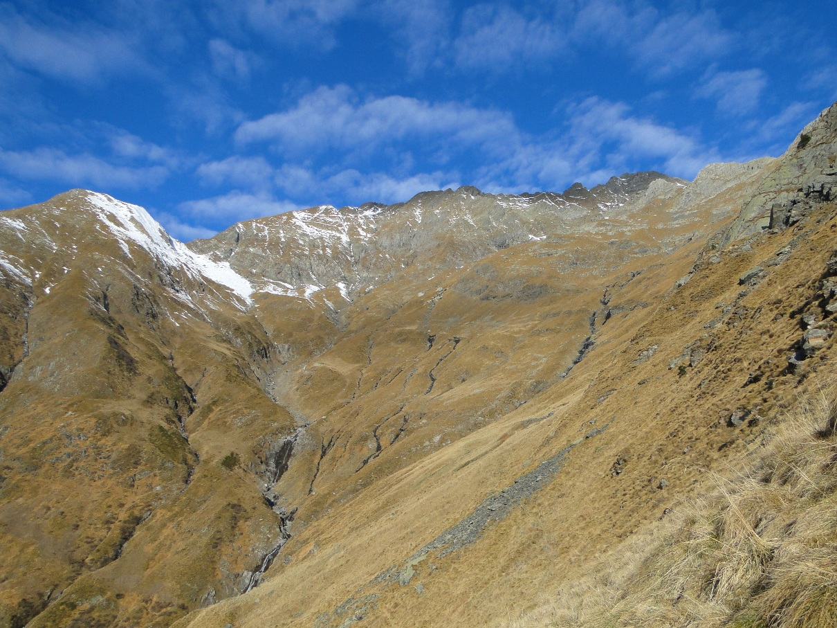 Testata val Grabiasca, con monte Grabiasca e pizzo Poris Gandellino (BG)